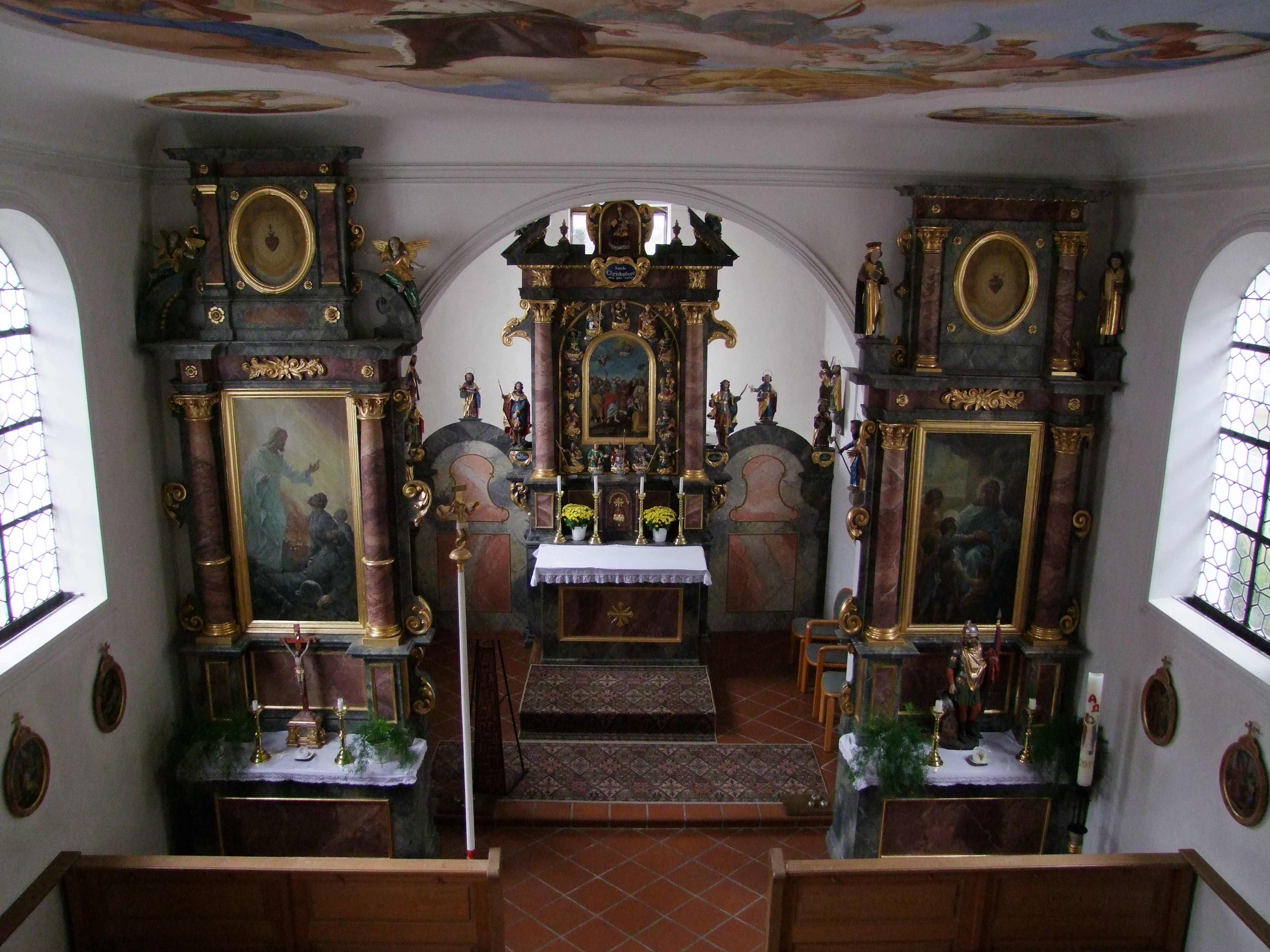 St. Christophorus im oberschwäbischen Frankenhofen bei Bad Wörishofen in Bayerisch/Schwaben